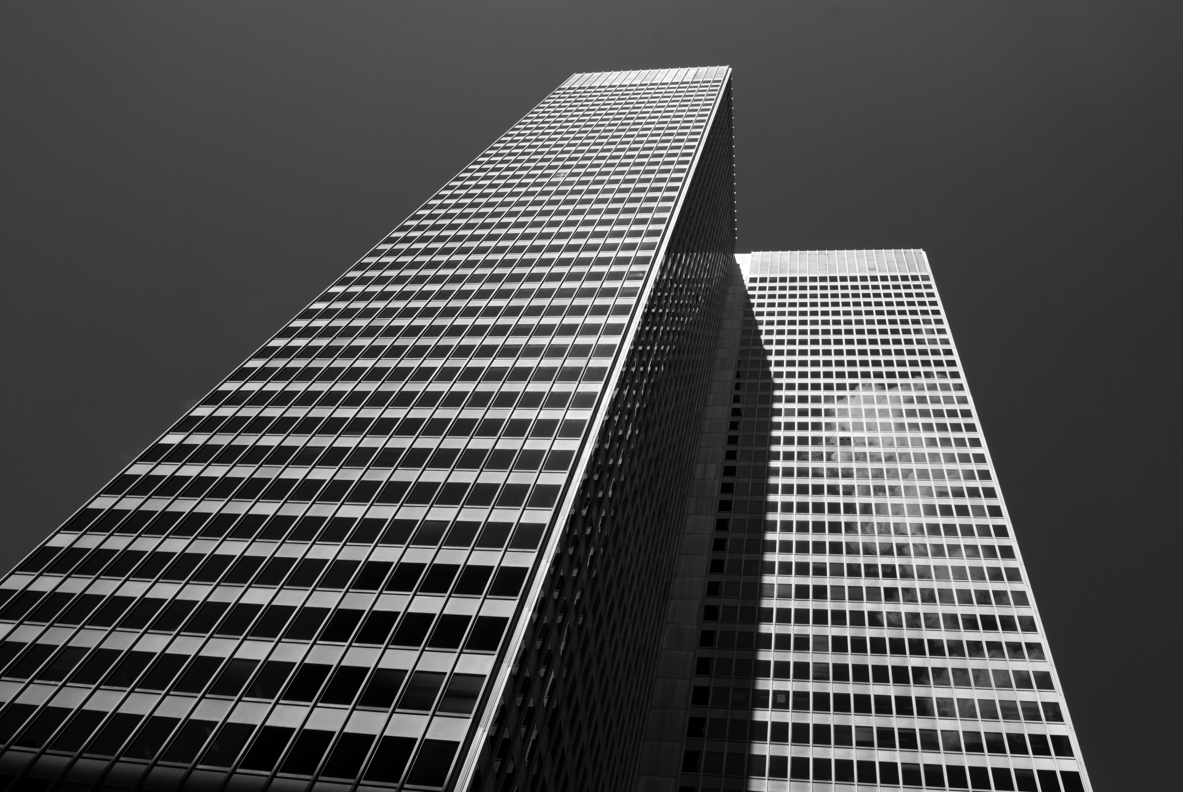 MONTREAL